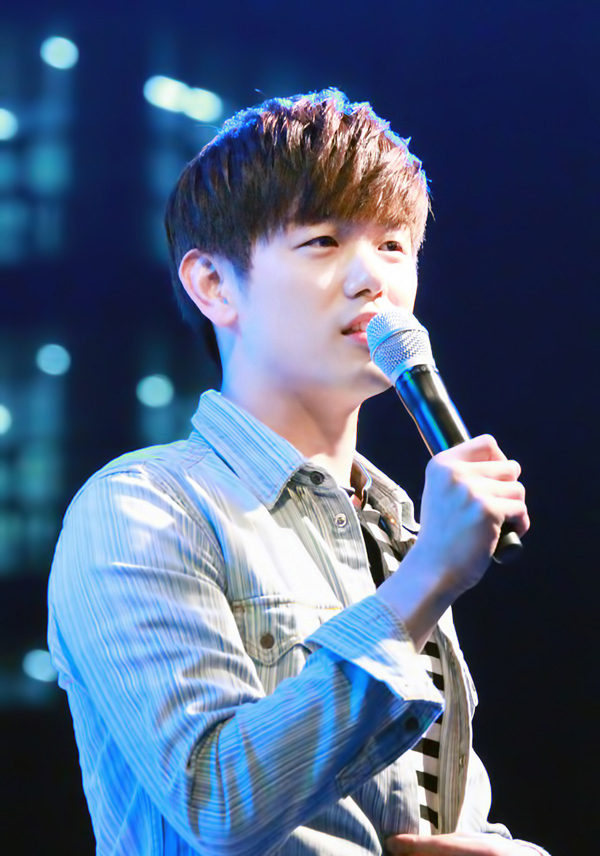 2016년 5월 26일 수원 경희대학교 국제캠퍼스 축제에서 에릭남.